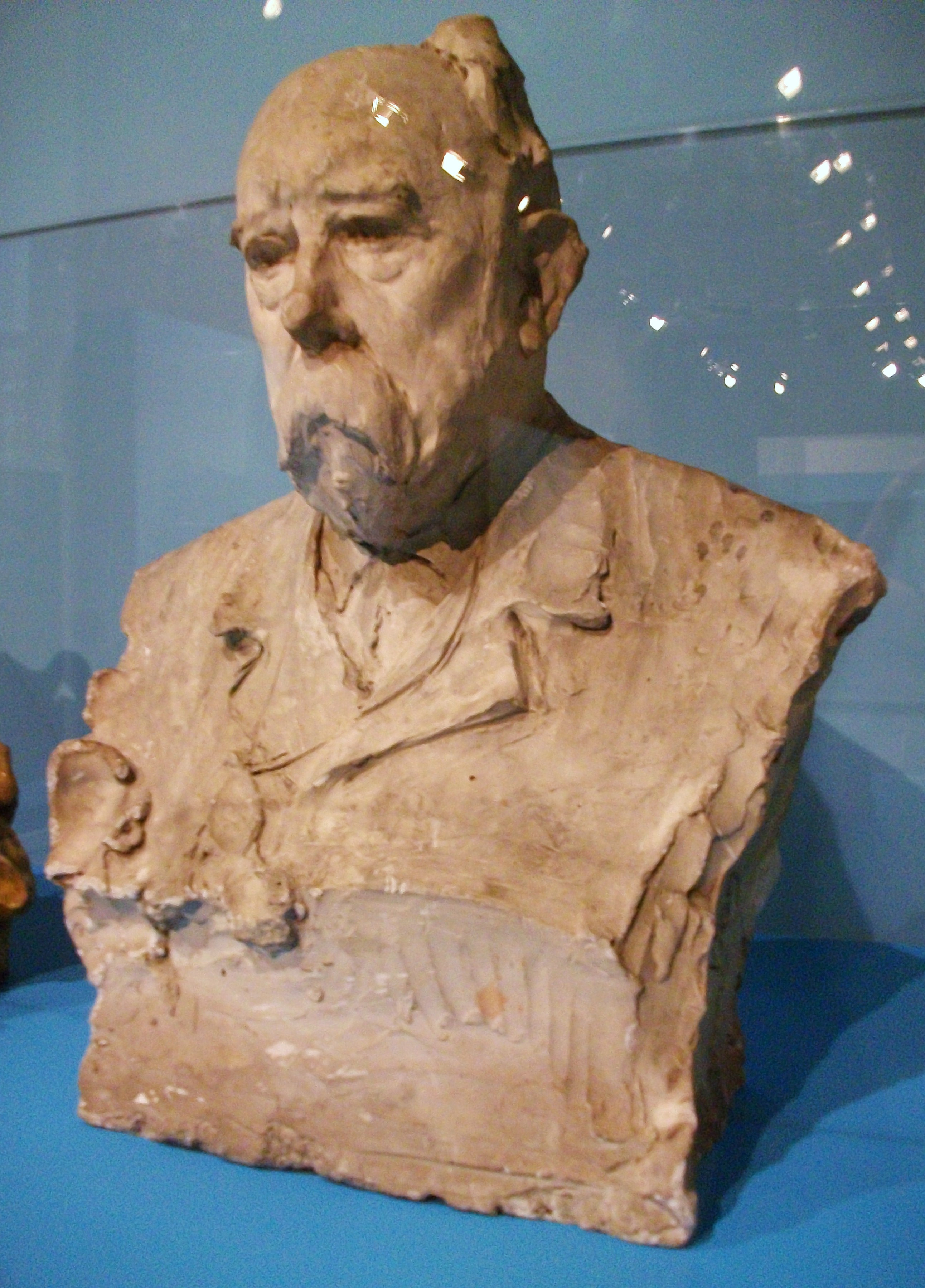 Esbòs del bust de Teodor Llorente i Olivares per al monument del Parc de la Ciutadella de Barcelona, Eusebi Arnau i Mascort. Guix amb ànima de metall, 1909.